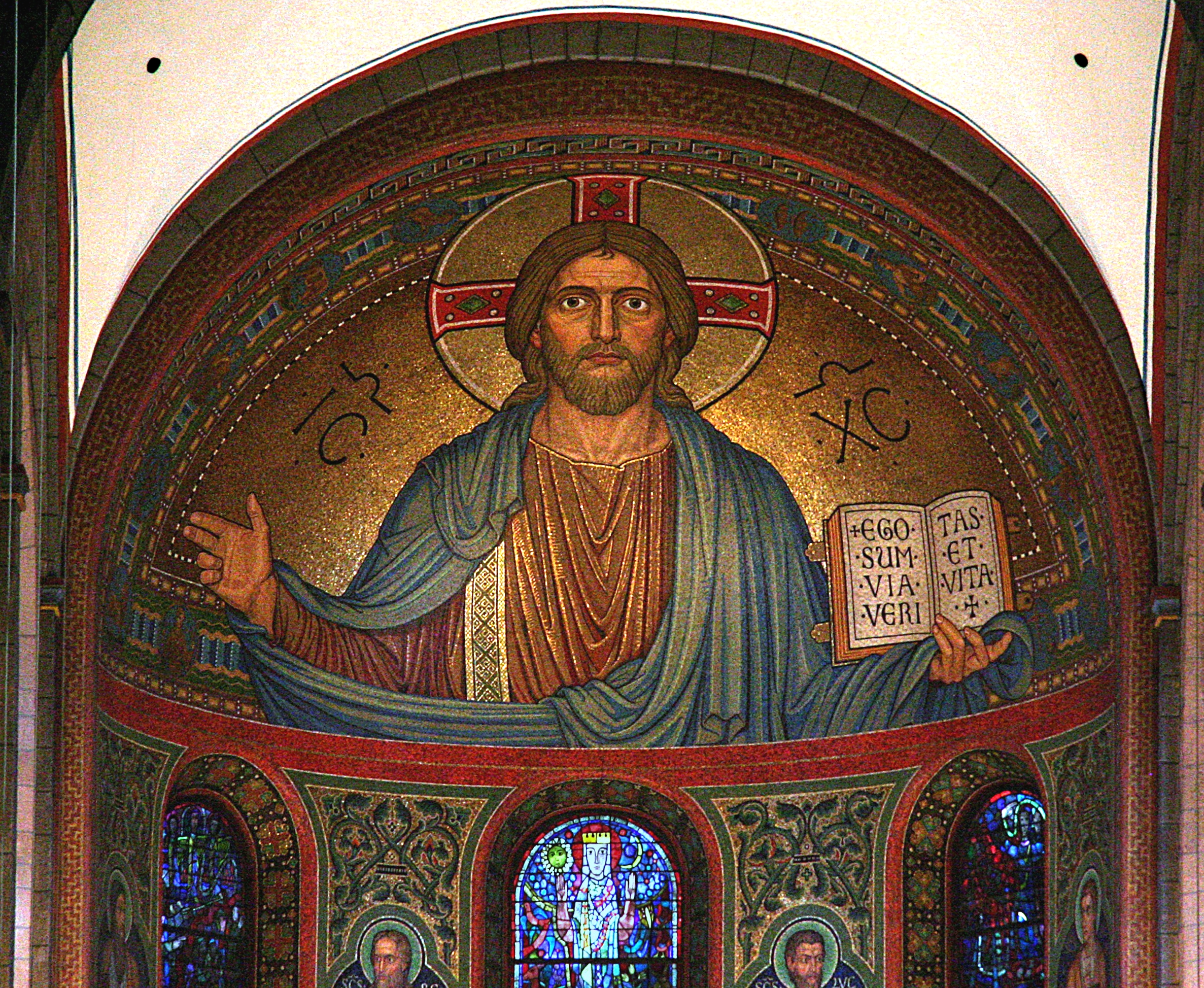 Christus als Weltenherrscher, Mosaik in der Apsis der Abteikirche Maria Laach von Pater Andreas Göser (1863–1925), fertiggestellt 1911